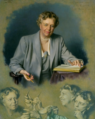 Anna Eleanor Roosevelt